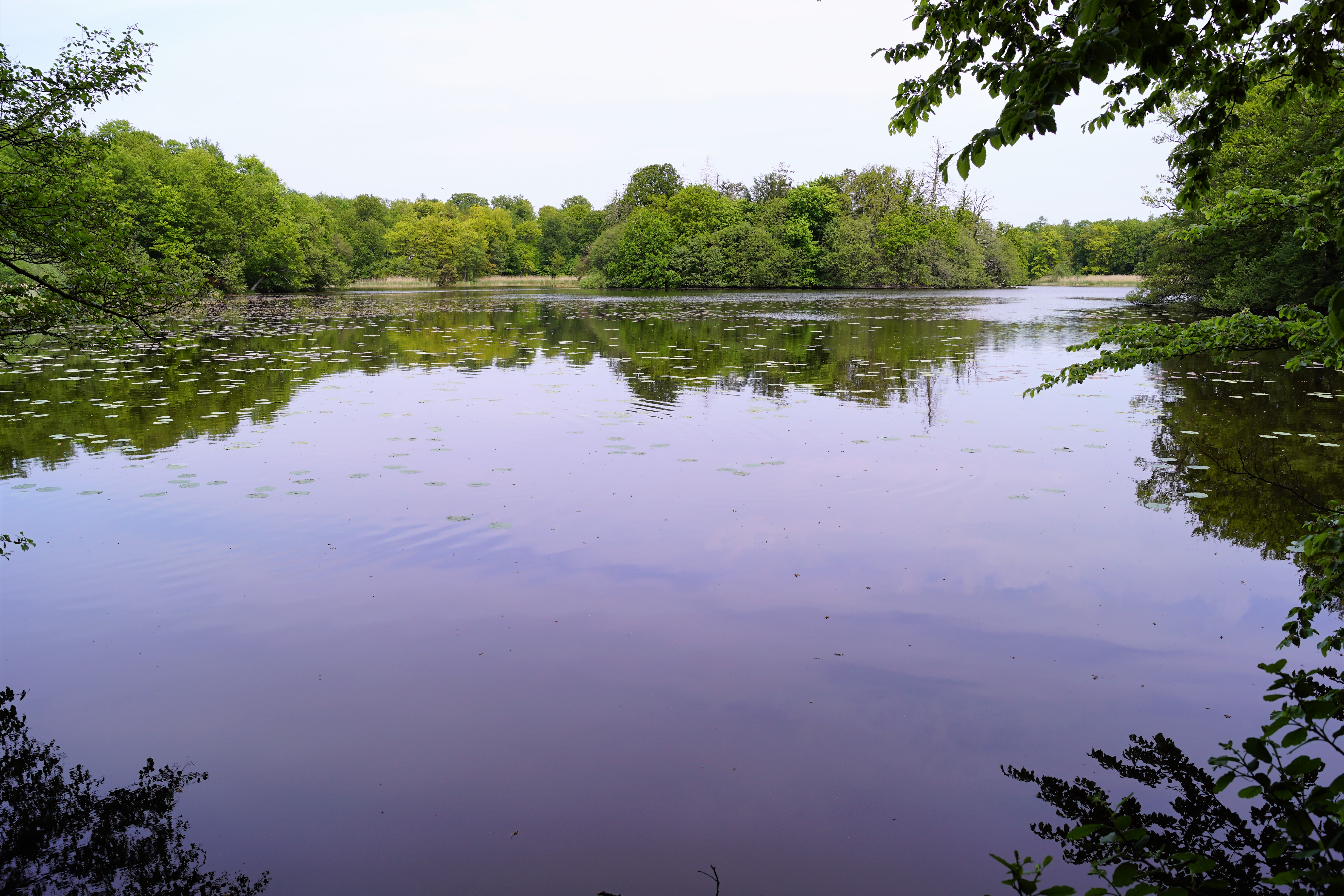 Bondedam ved Hellebæk i Nationalpark Kongernes Nordsjælland